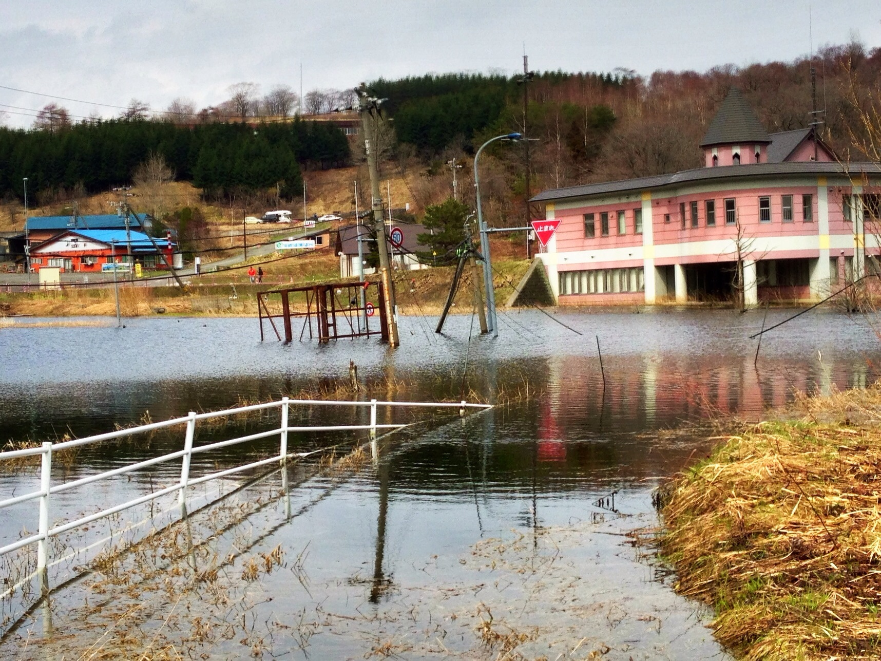 有珠山の噴火に伴う地殻変動で、水没した建物と道路